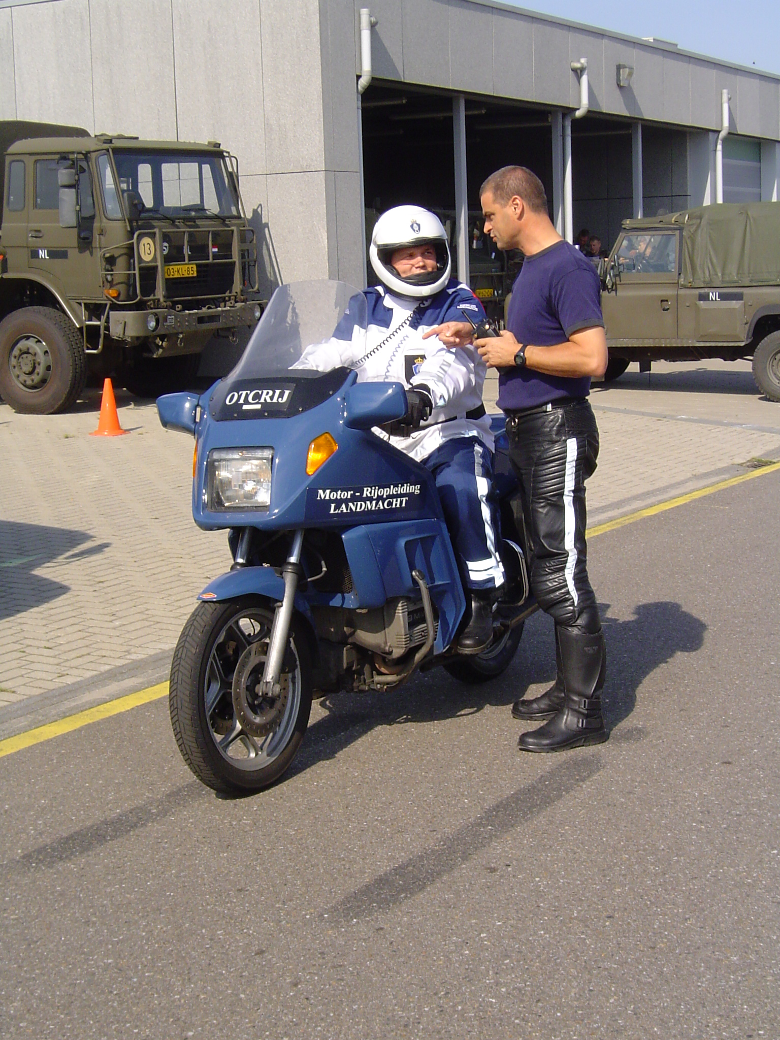 Broodrijder (rij-instructeur) leidt broodrijder (Marechaussee) op. Oude escorte-motoren krijgen een tweede jeugd in de motoropleiding van de Koninklijke Marechaussee. Een motorrijder van de Koninklijke Marechaussee wordt opgeleid door een instructeur van de Koninklijke Landmacht.